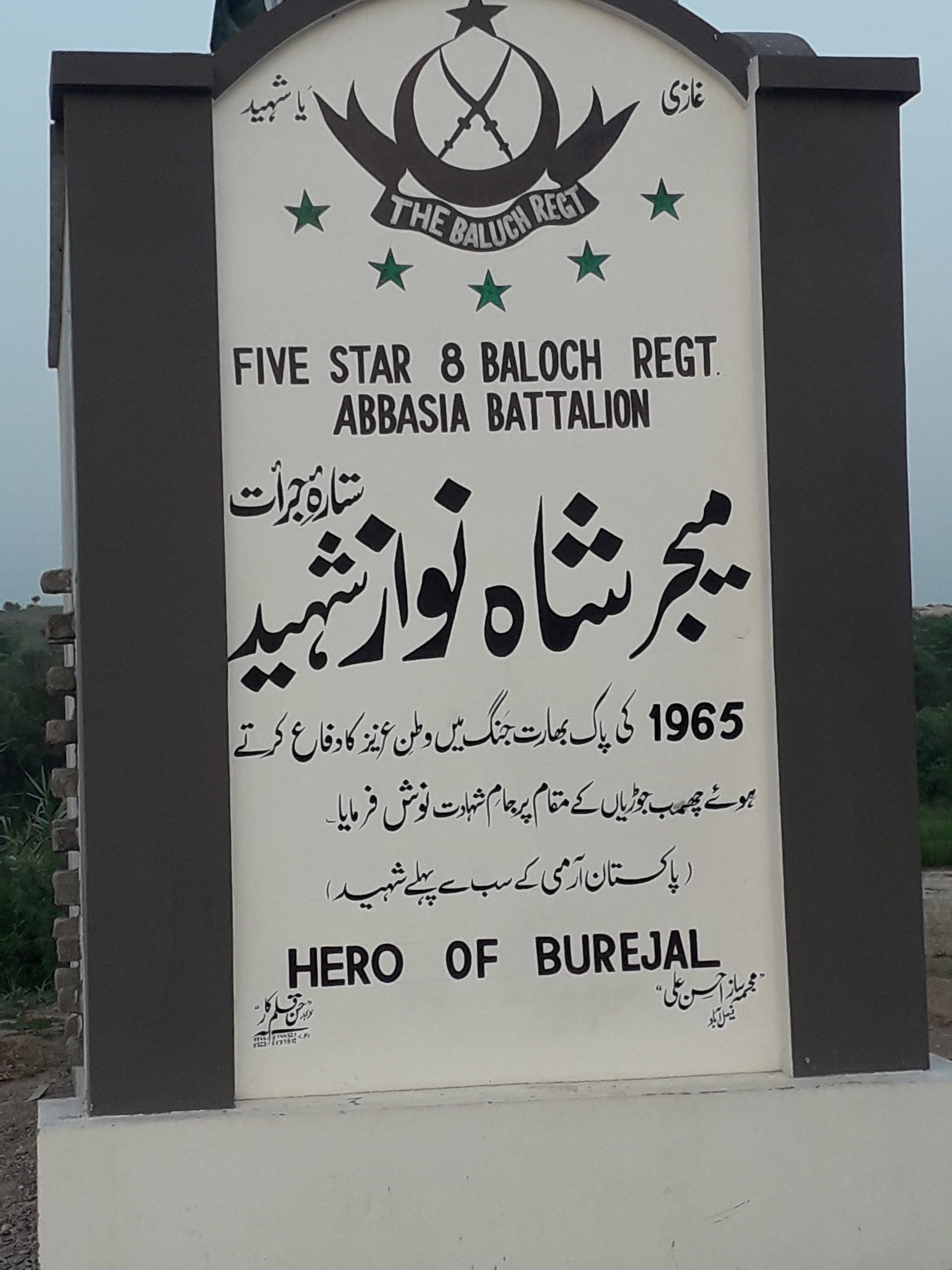 پاک انڈیا جنگ 1965 کے ہیرو